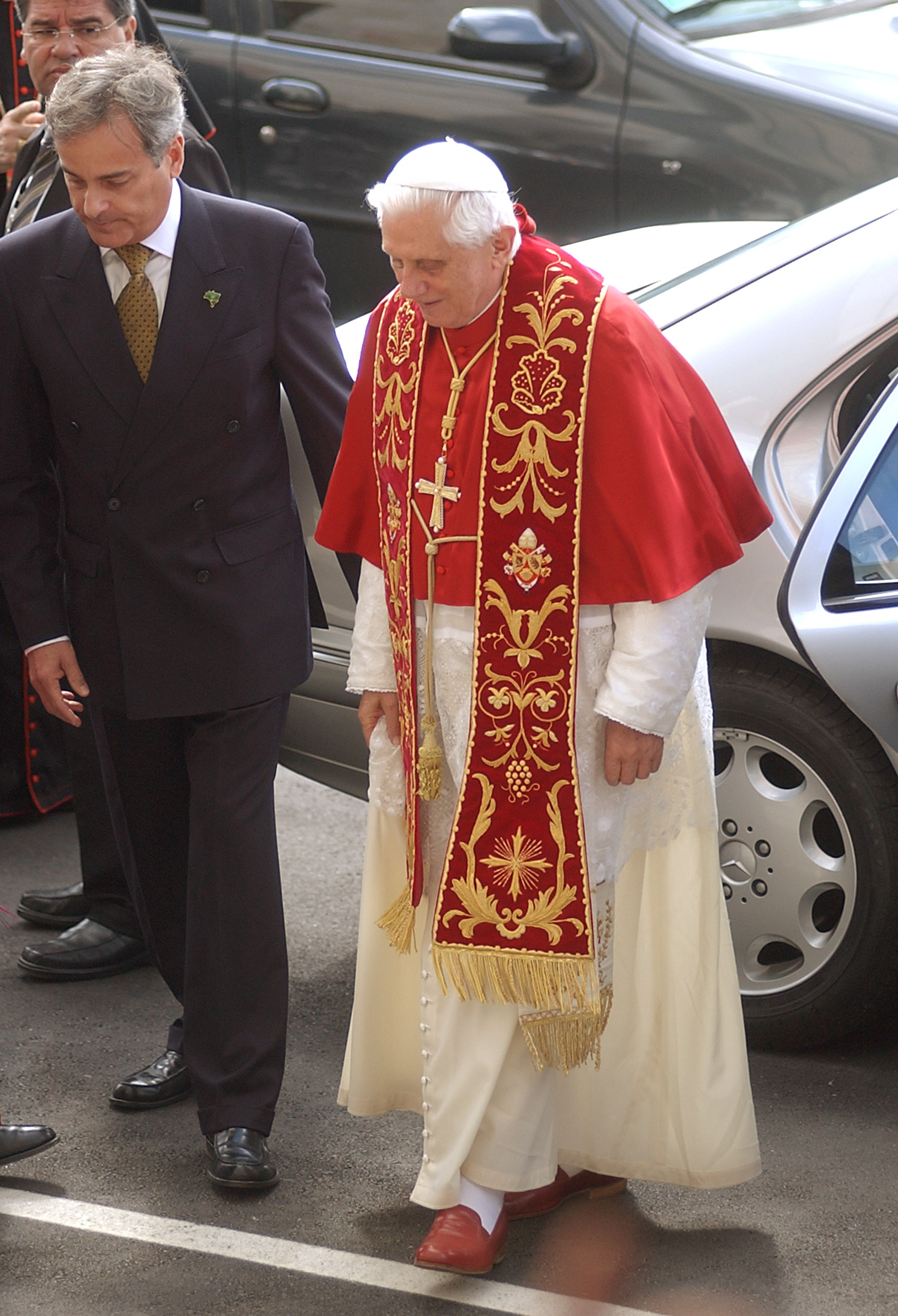 Papa Bento XVI chega ao Palácio dos Bandeirantes, residência oficial do governador do estado de São Paulo.